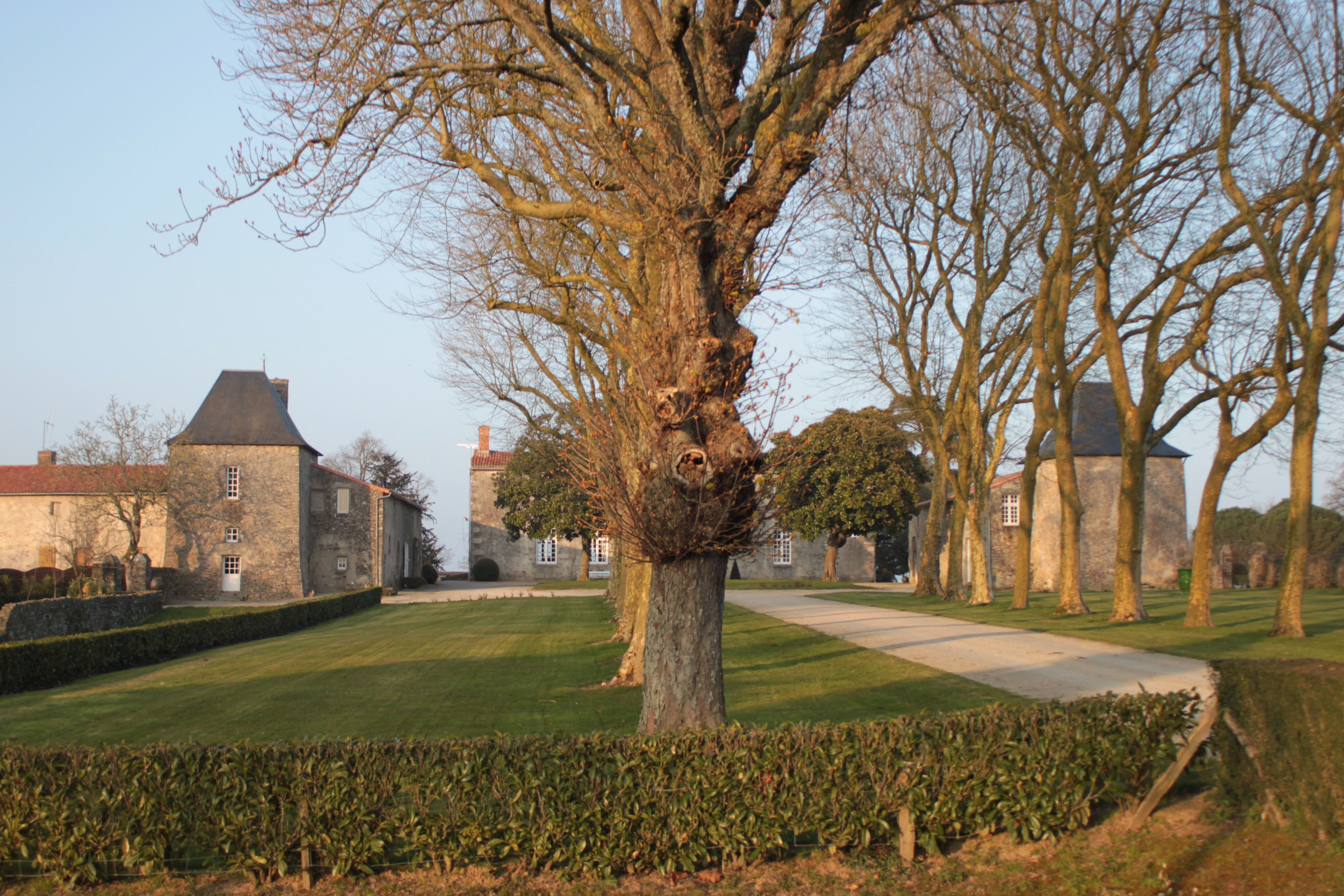 Logis de la Roche-Thévenin, Fr-85-La Guyonnière.